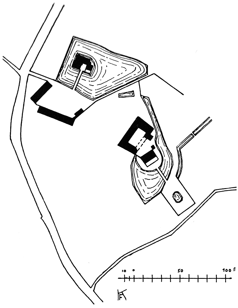 Lageplan des Soerser Hauses in Aachen-Laurensberg